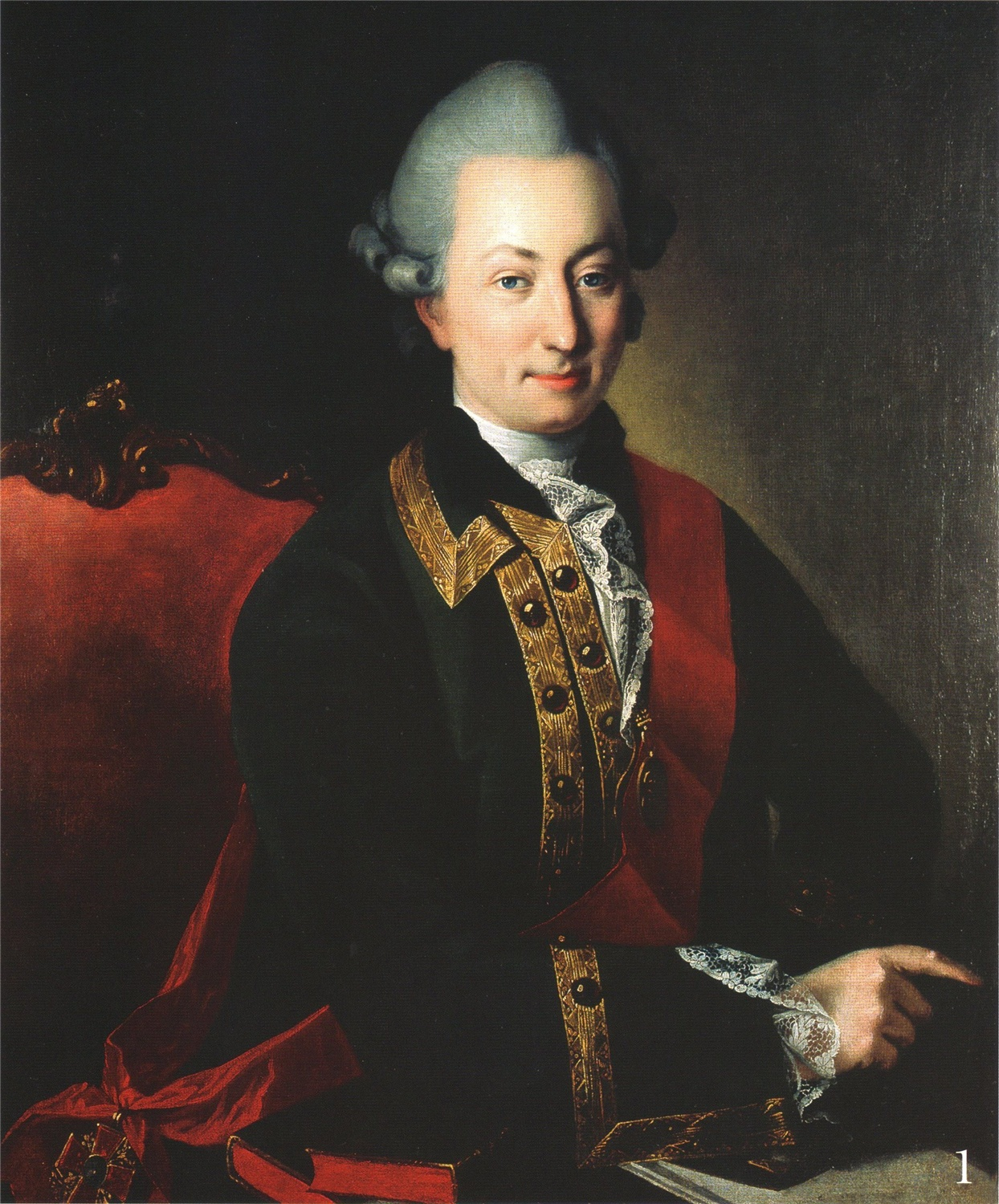 "Портрет графа Ф.Г. Орлова"